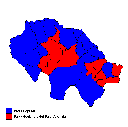 Partits polítics més votats als municipis de l'Alt Palància (País Valencià) després de les eleccions municipals de 2007.